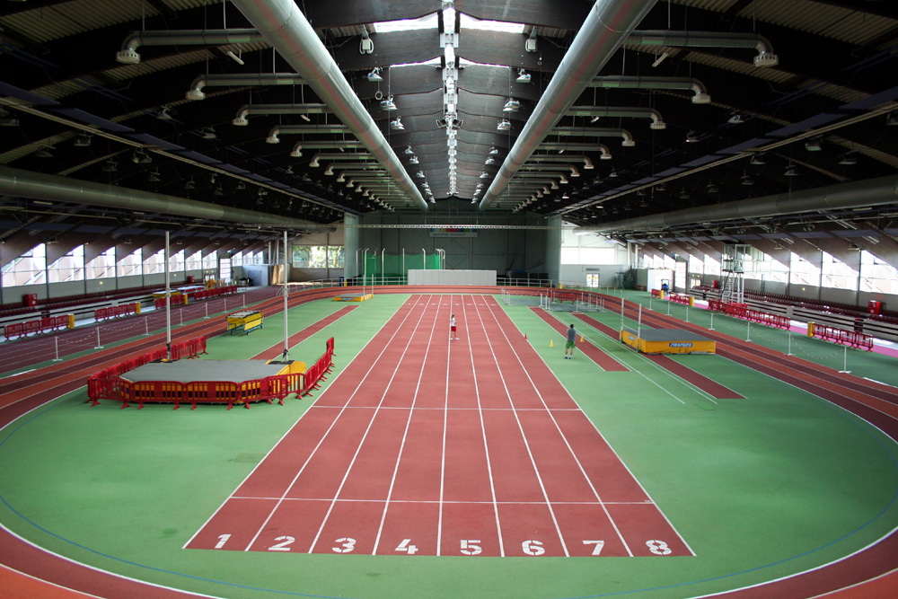 Leichtathletikhalle in Düsseldorf mit einer Rundbahn über 200m.